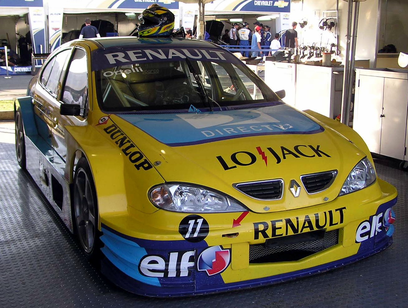 TC2000 "Renault TC2000 Team": Renault Megane#11 Guillermo Ortelli